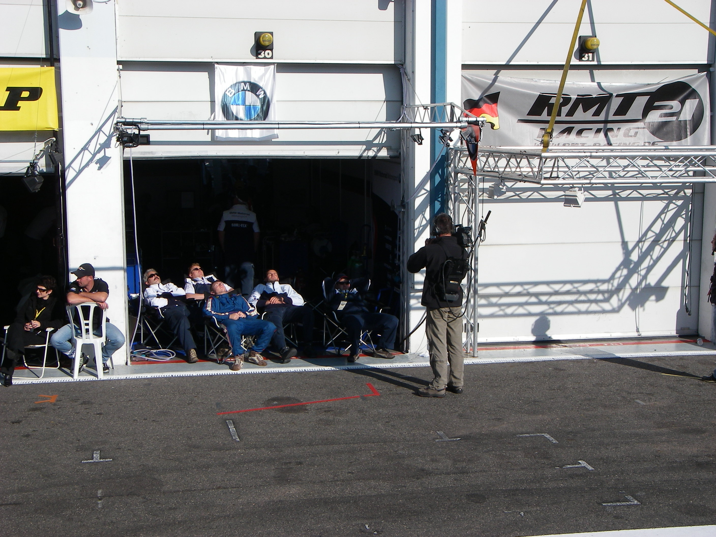 Morgengrauen, Bol dOr 2007